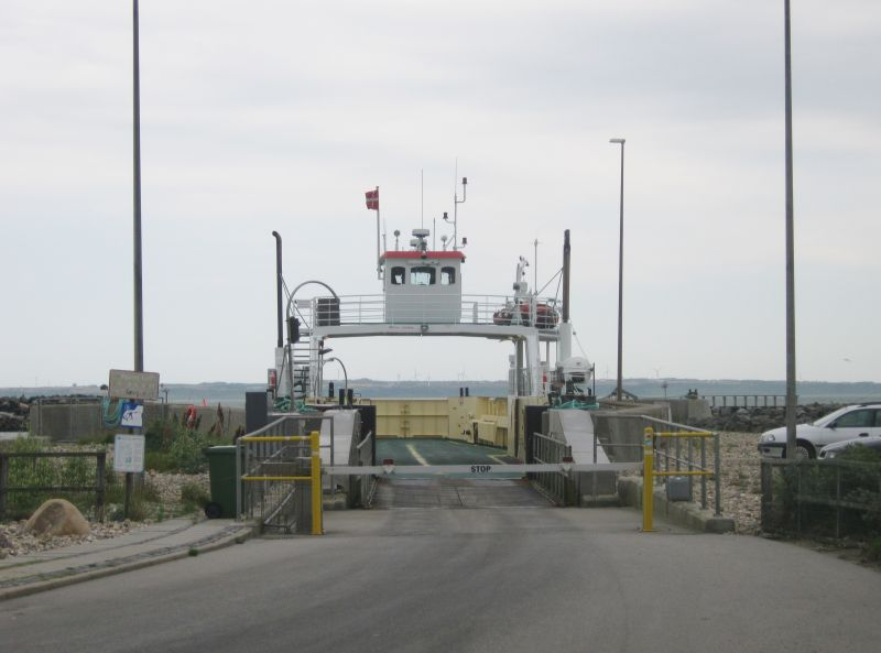 Fähre über den Limfjord von Thyborøn zur Agger Tange